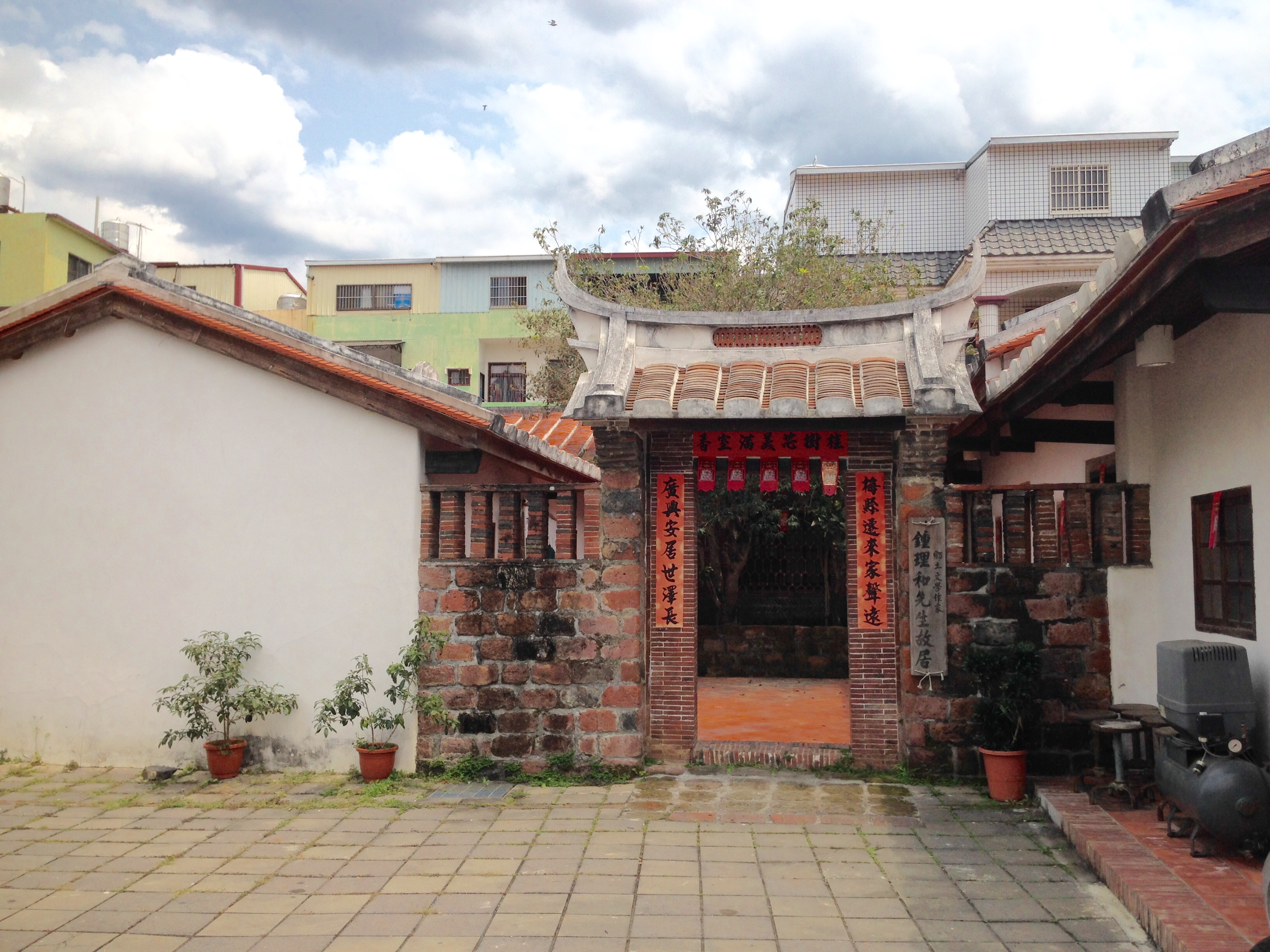 鍾理和、鍾浩東故居